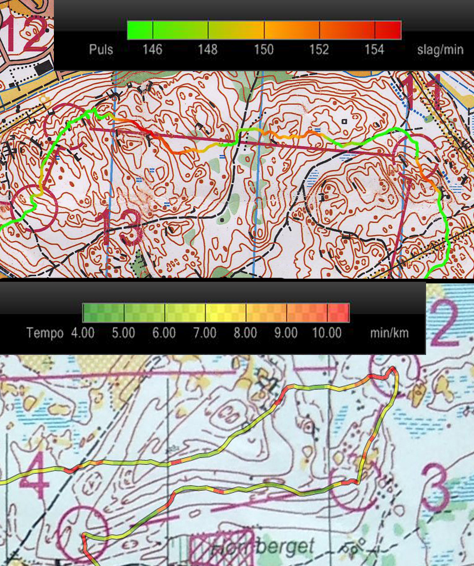 Puls/Speed Orienteering